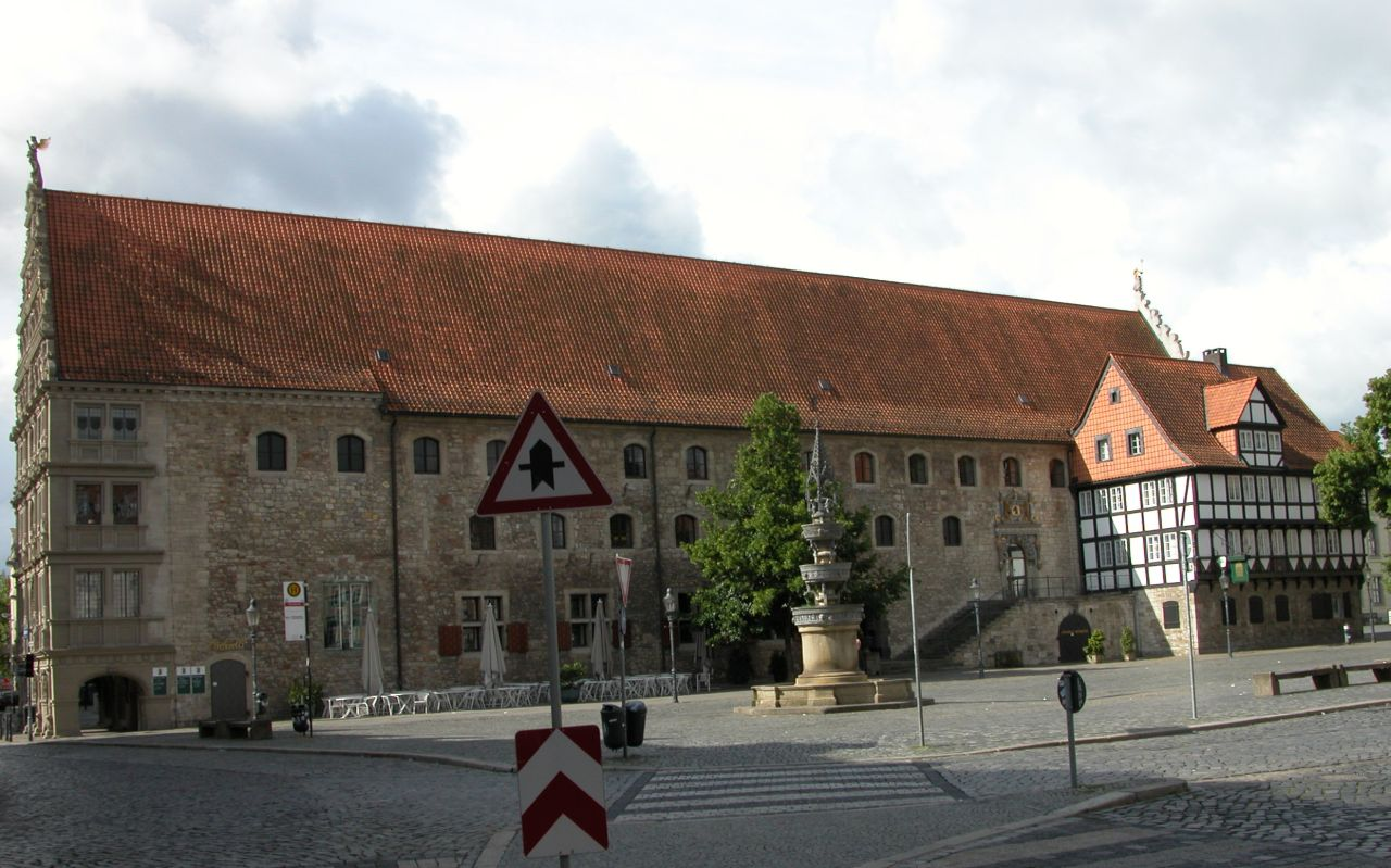 Braunschweig: Nordseite des Gewandhauses mit Brunnen auf dem Altstadtmarkt